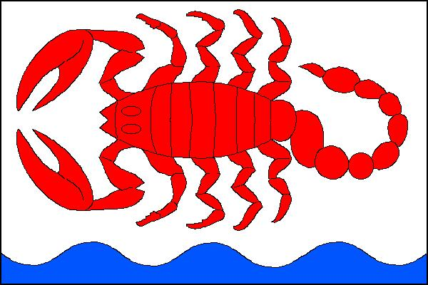 vlajka obce Slatinice